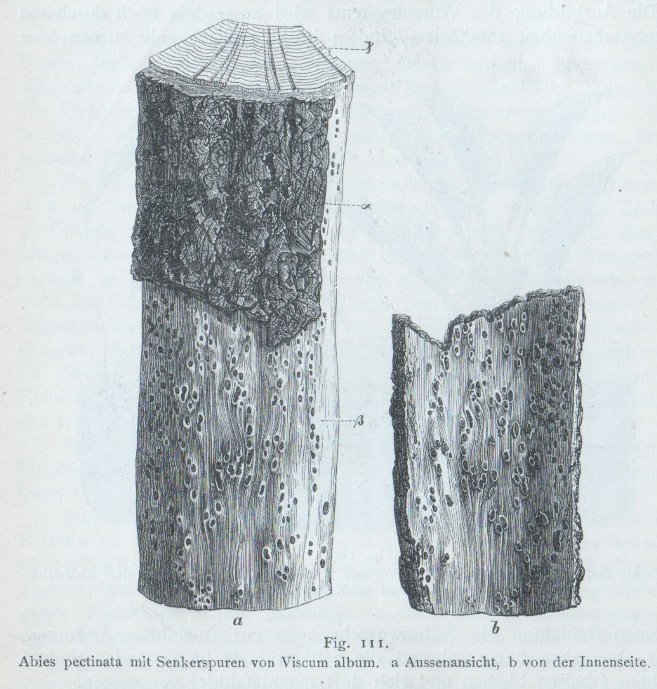 Gravure concernant du bois guité